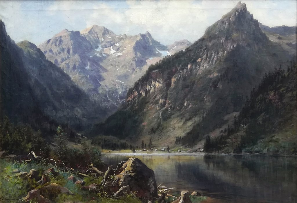 Jezero v Alpách 55 cm x 80 cm